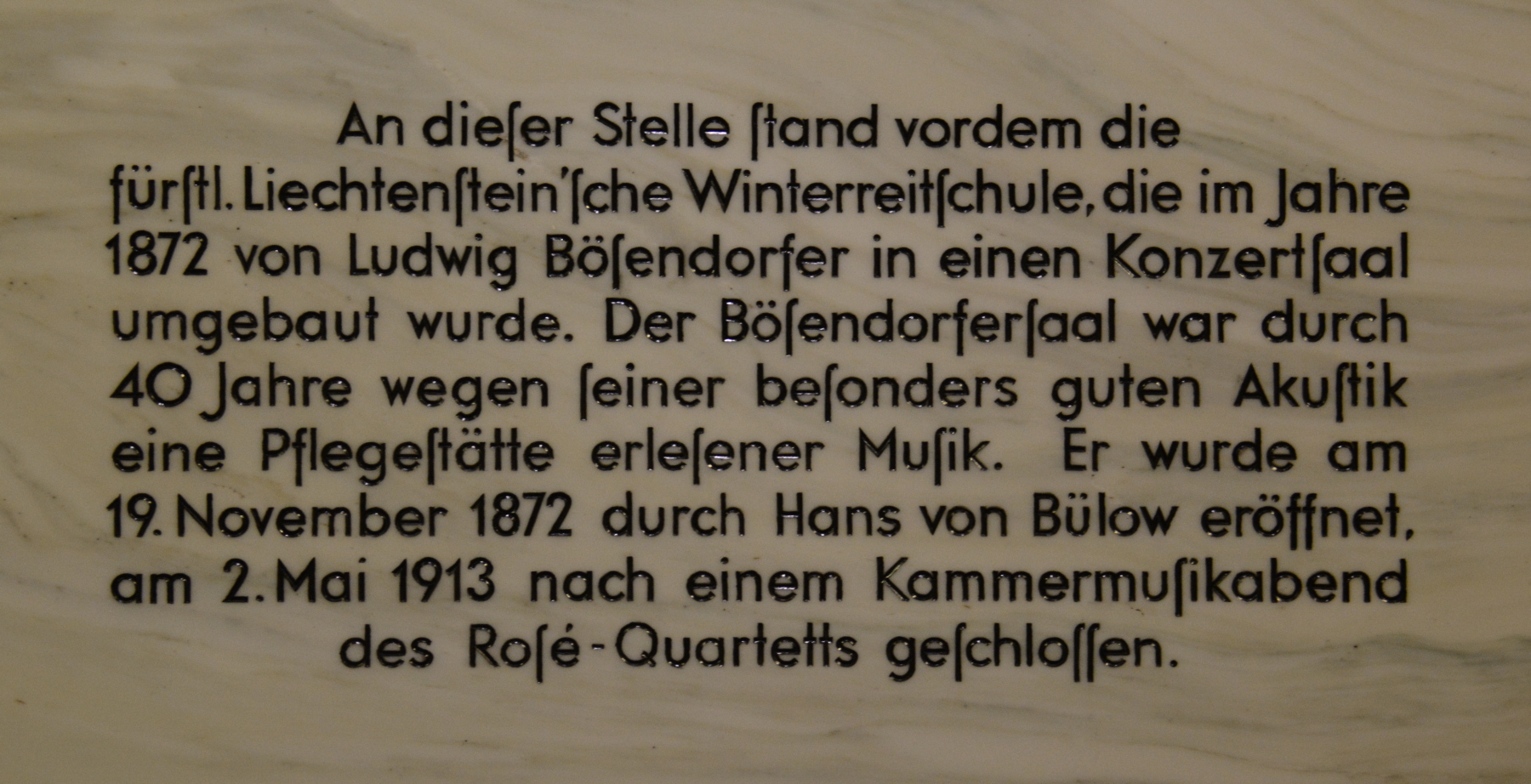 Zweites Wiener Hochhaus - Inschrift im Foyer